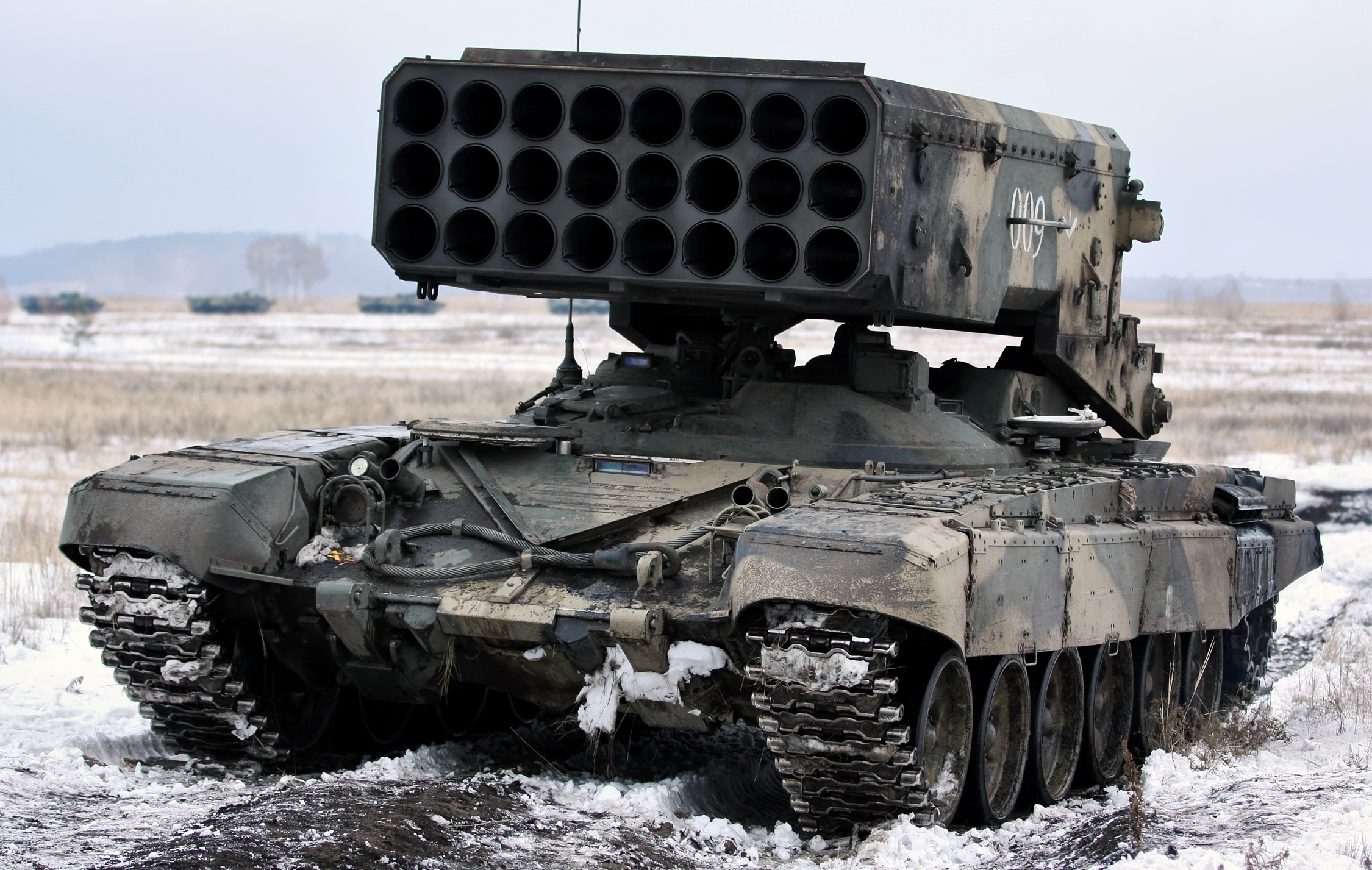 Боевая машина БМ-1 из состава тяжелой огнеметной системы залпового огня ТОС-1А (Combat vehicle BM-1 from TOS-1A heavy flamethrower system)